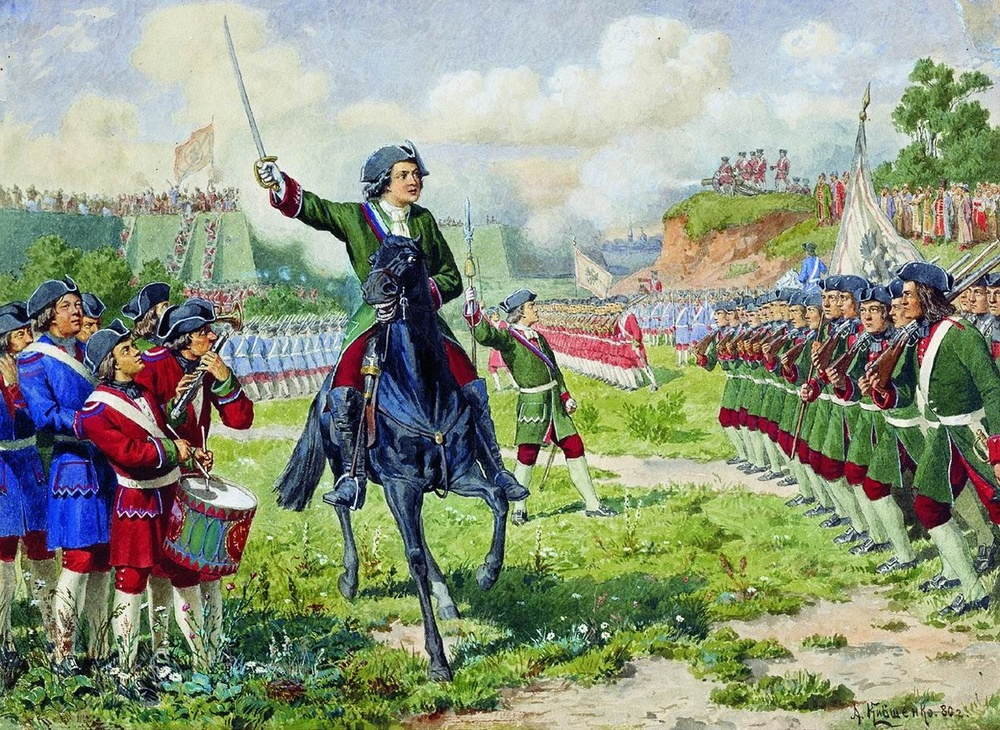 Это картина русского художника Алексея Кившенко